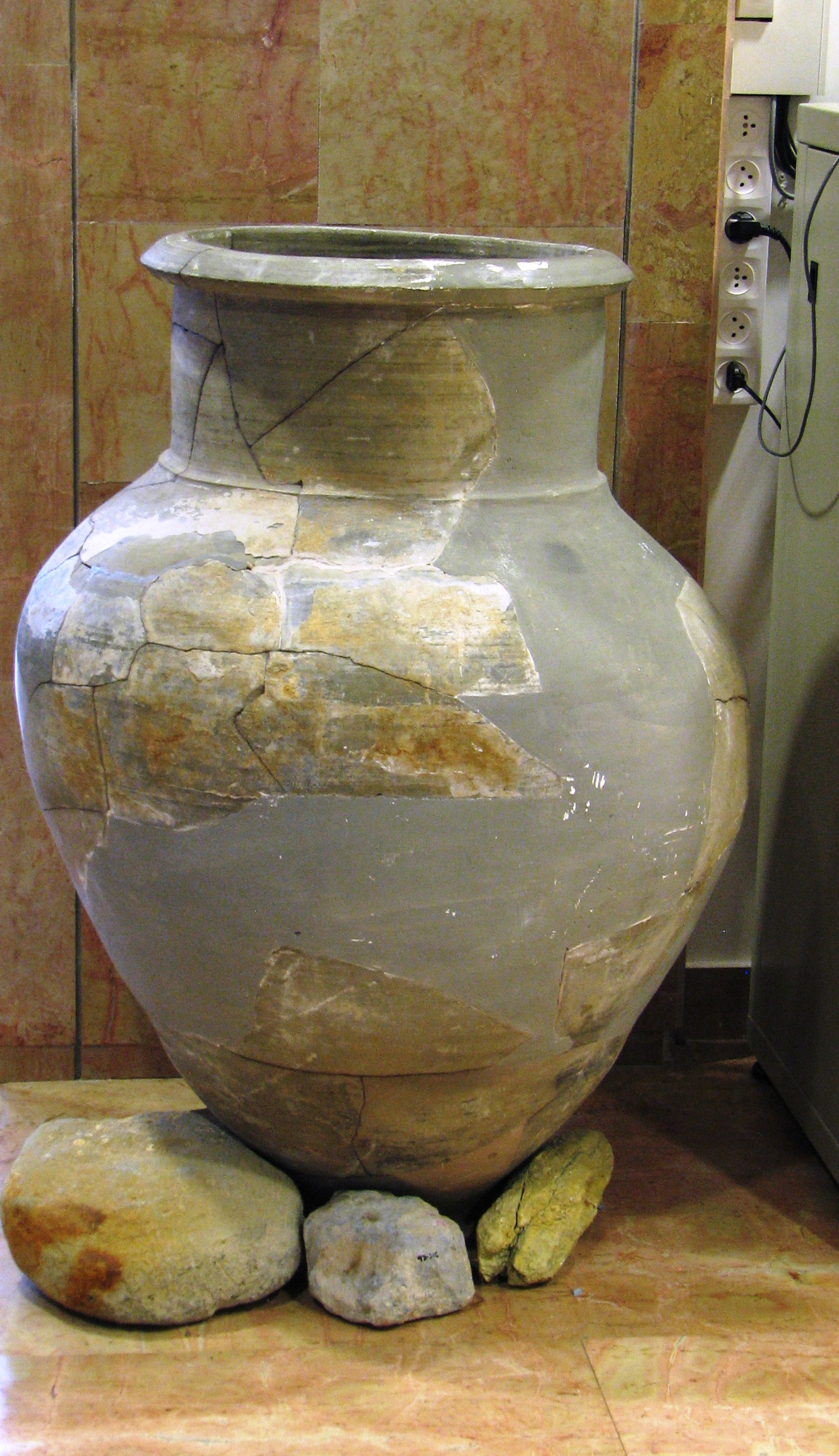 The Ma'agan Michael Ship is a 5th-century BC merchantman discovered off the coast of Ma'agan Michael, Israel, in 1985. הספינה העתיקה ממעגן מיכאל, היא ספינת סוחר פניקית מעץ מסוף המאה החמישית לפנה"ס שהתגלתה ב-1985 בים במרחק 70 מטר מחוף קיבוץ מעגן מיכאל בעומק של שני מטר שברי פיטס לאחר רפאות שנמצאו בסמוך לבסיס התורן